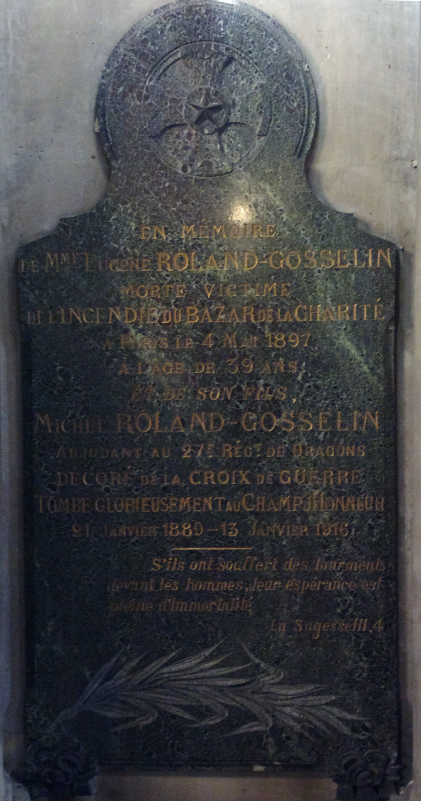 L’église Saint-Philippe-du-Roule se trouve 154 rue du Faubourg-Saint-Honoré, dans le 8ème arrondissement de Paris. Plaque du décès d’Eugène Roland-Gosselin lors de l'incendie du Bazar de la Charité.